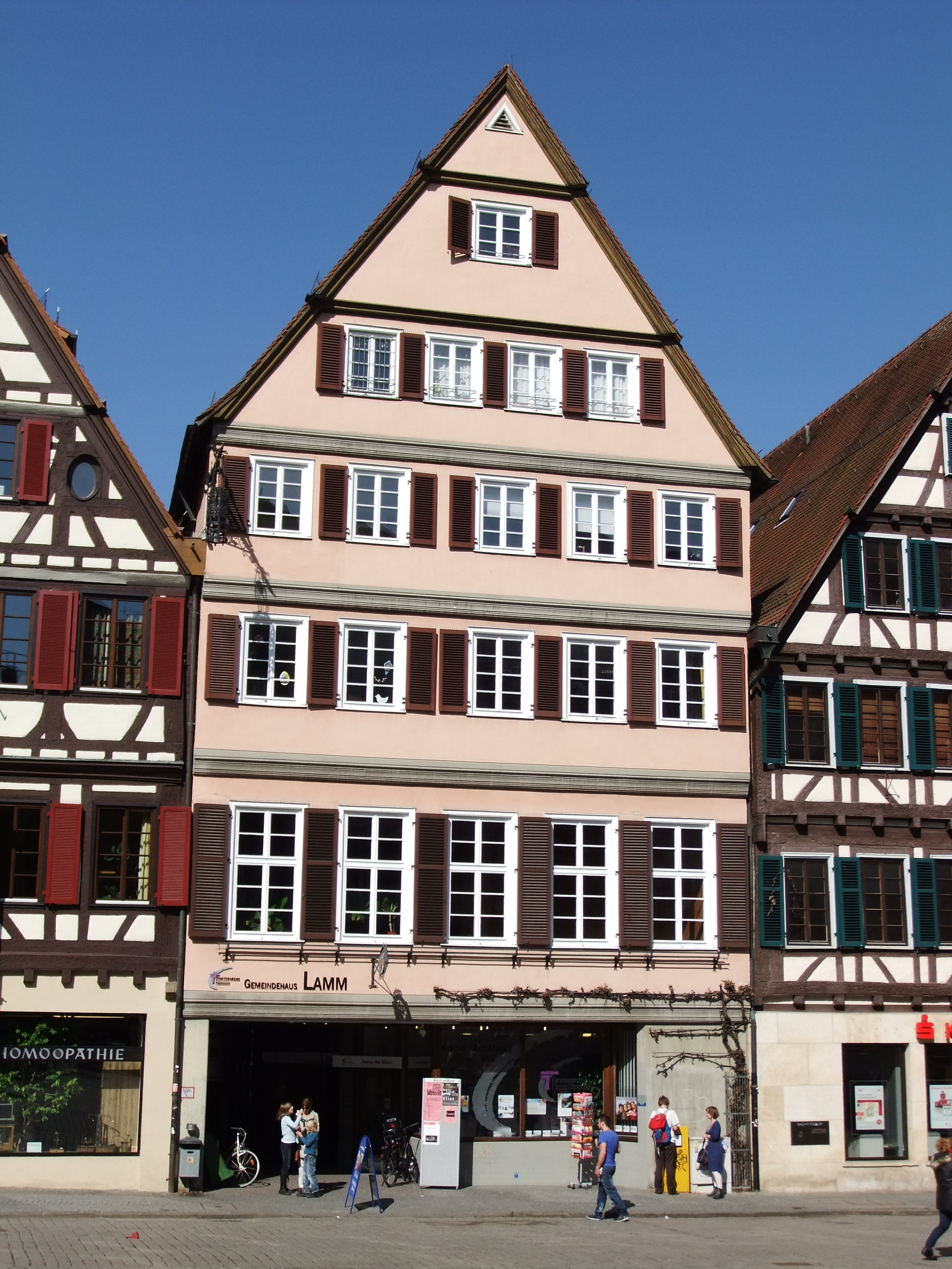 Gemeindehaus Lamm auf dem Tübinger Marktplatz. Das Gebäude aus den 1970er Jahren ersetze das an dieser Stelle stehendes Gasthaus Lamm.